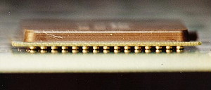 Lötverbindungen zwischen BGA und PCB